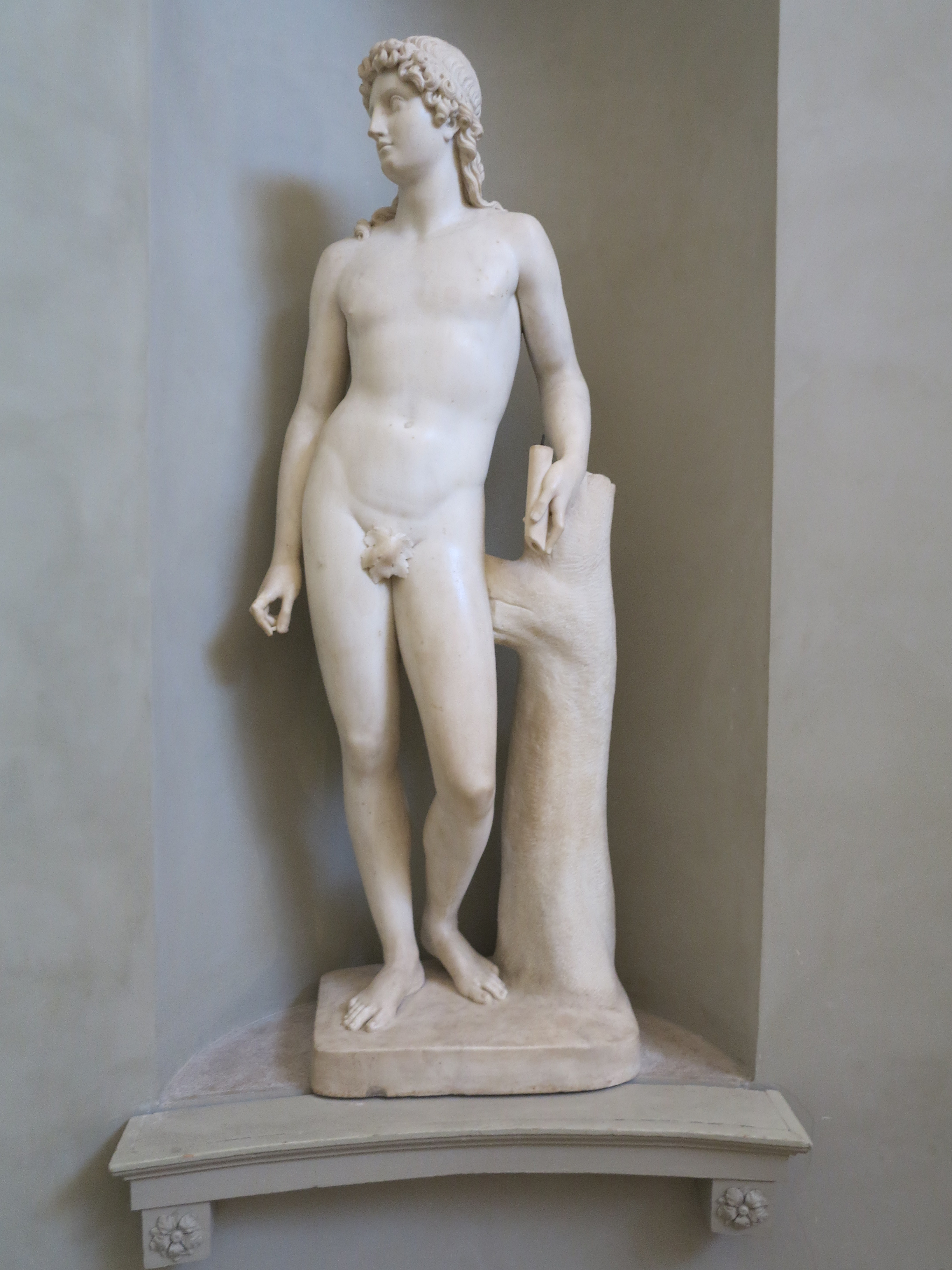 Gallerie dell'Accademia - MIBAC This is a photo of a monument which is part of cultural heritage of Italy.